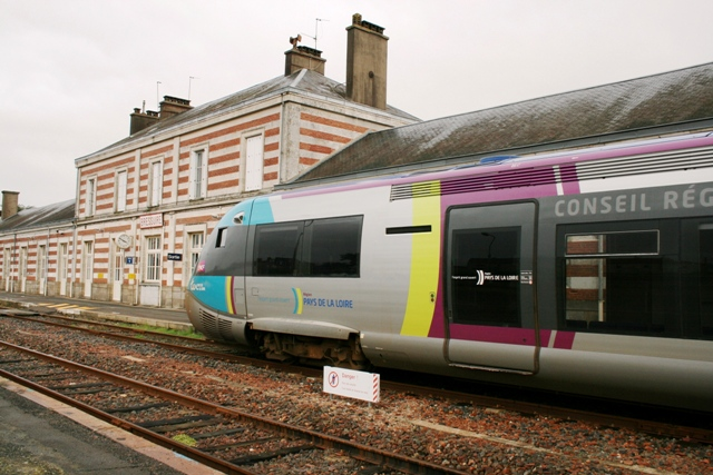 Français